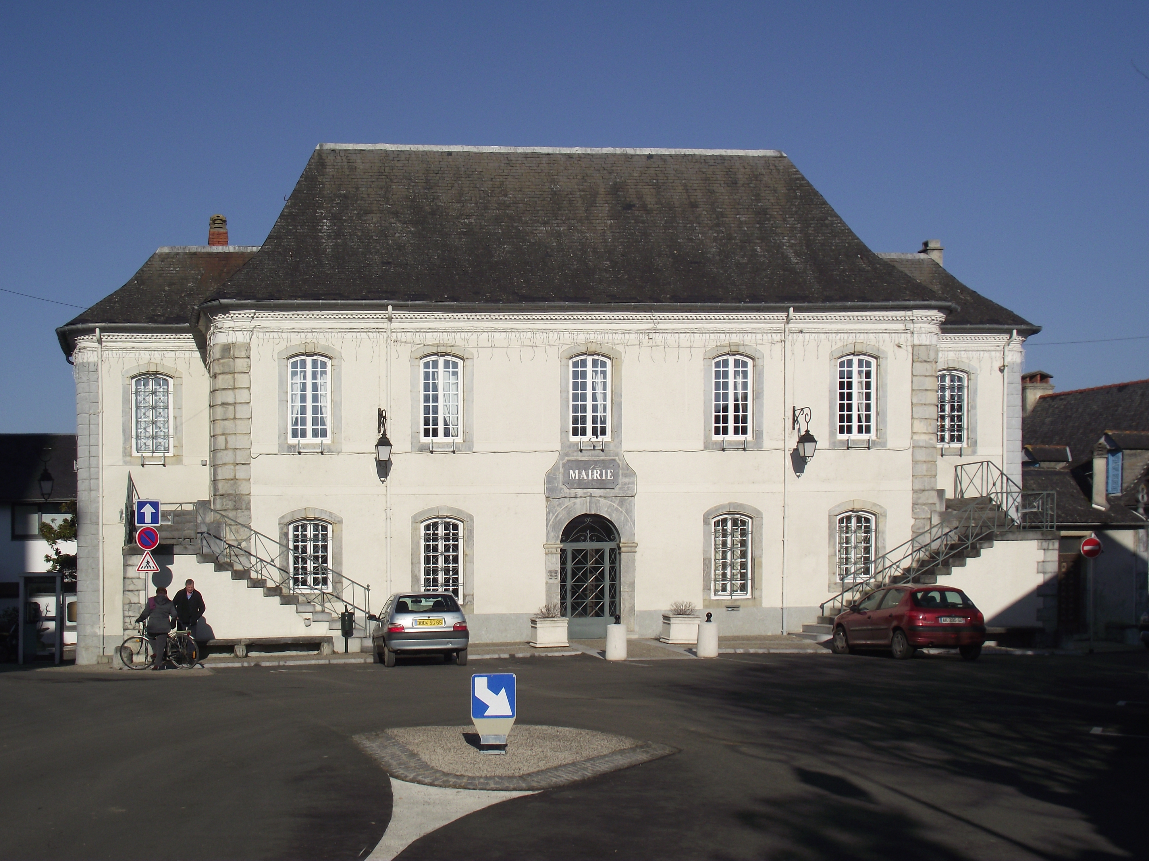 Mairie d'Ossun (Hautes-Pyrénées, France)